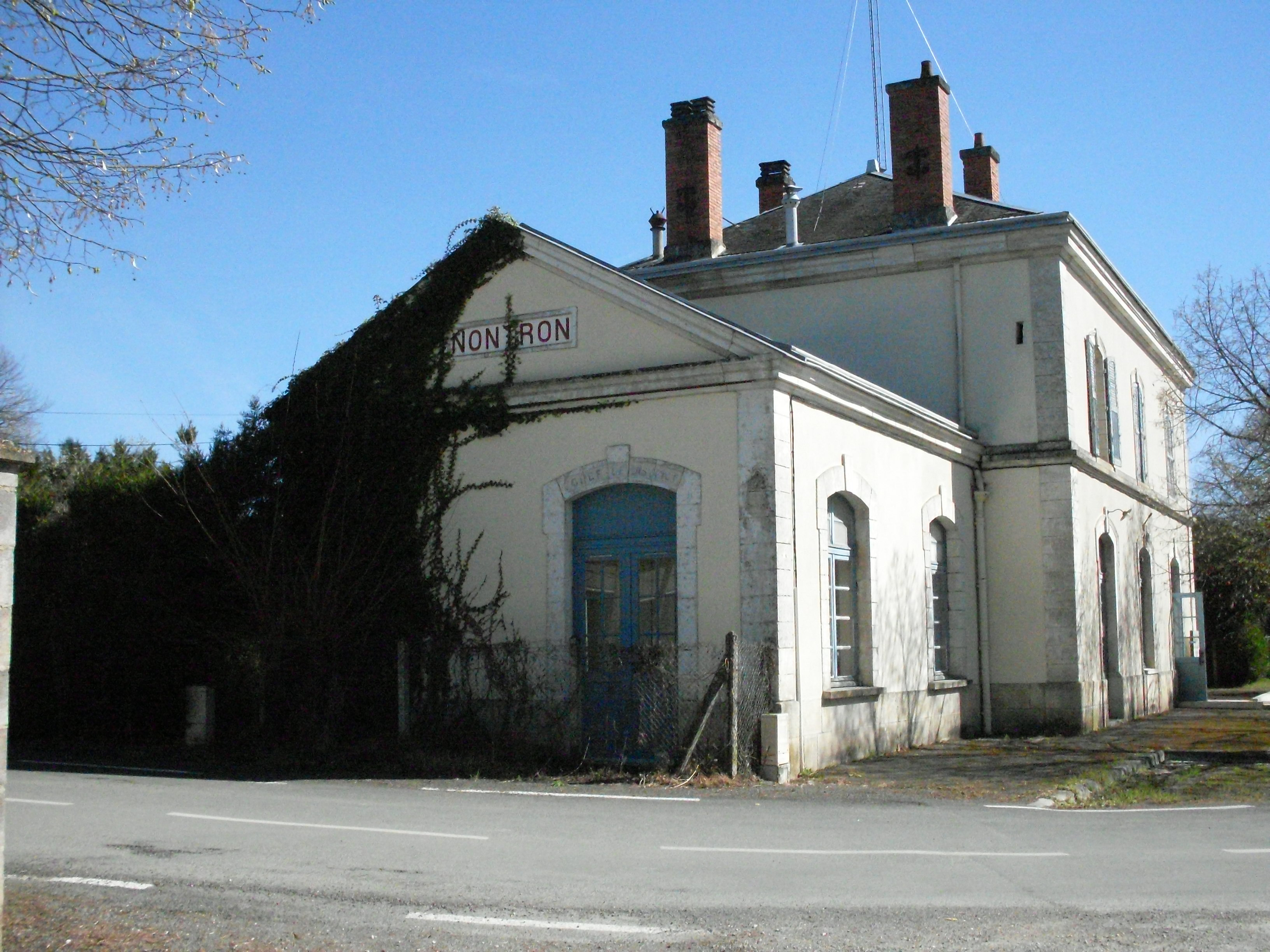 L'ancienne gare de Nontron.